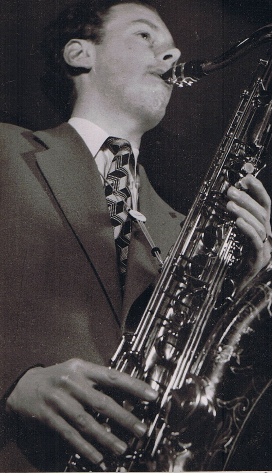 Stig Lalle Johansson Kortet tagits den 28 april 1950 av Norrlandsbild